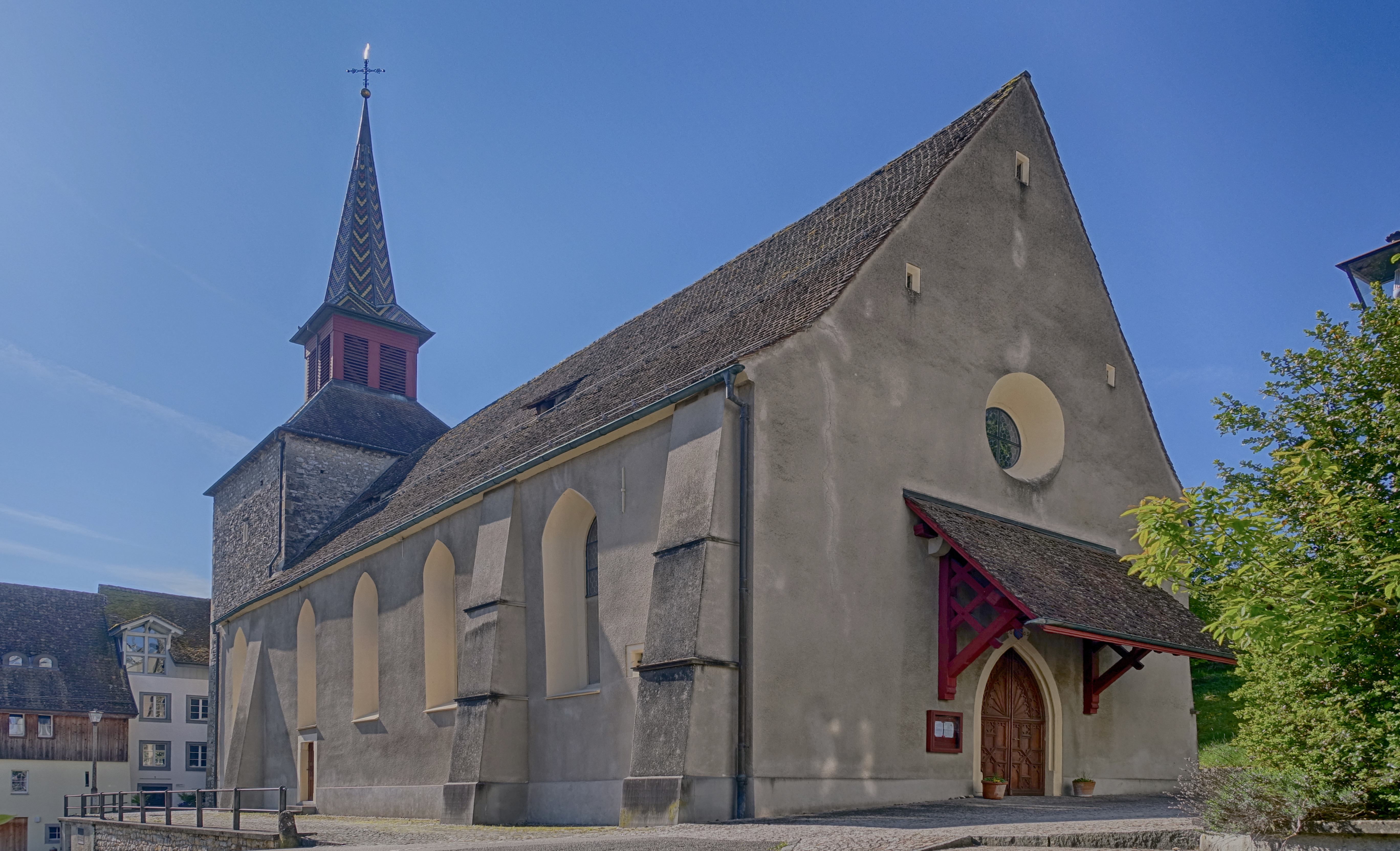 katholische Stadtkirche Sankt Katharina